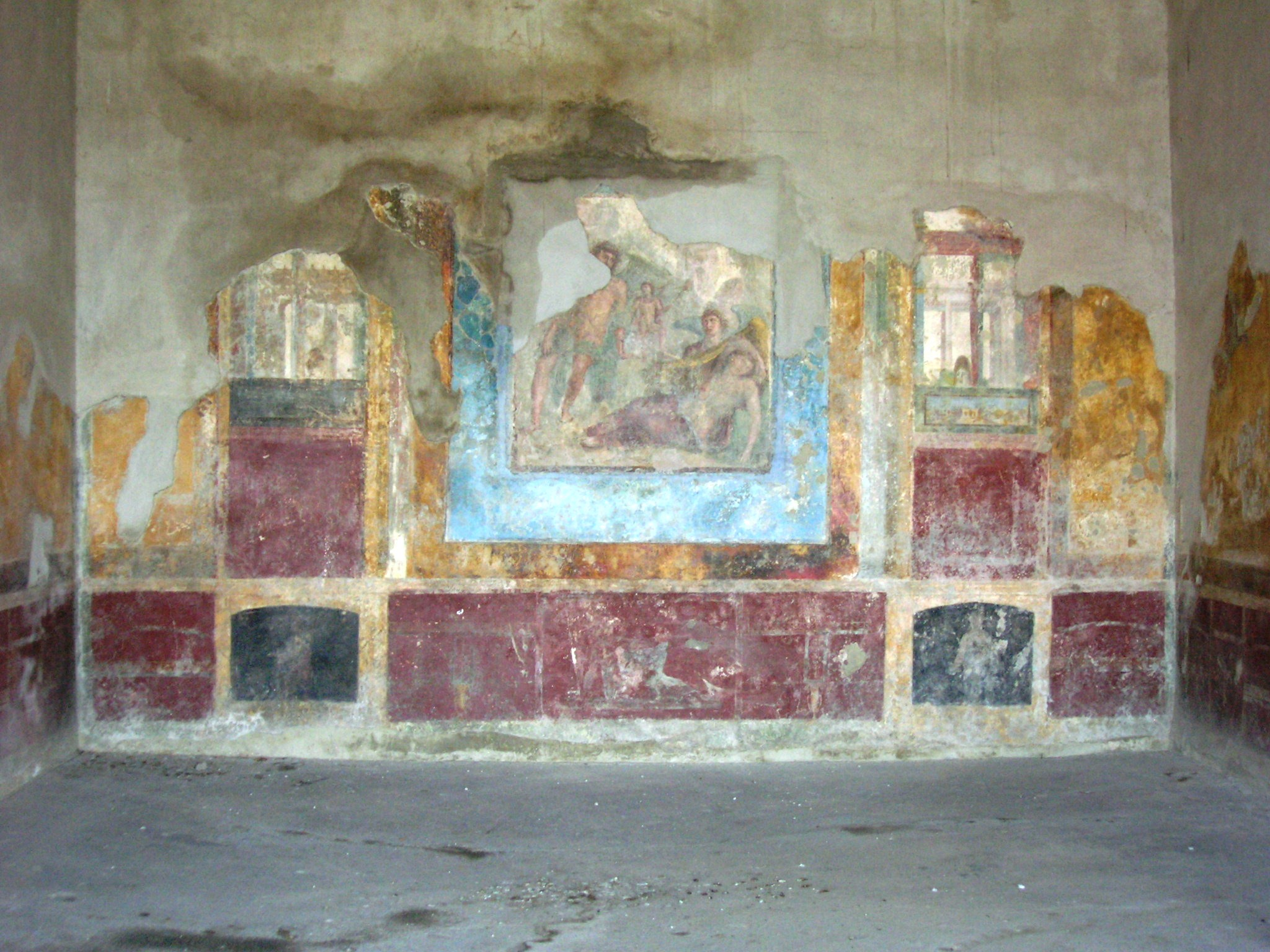 Villa Arianna, villa d'otium dell'antica Stabiae, l'odierna Castellammare di Stabia